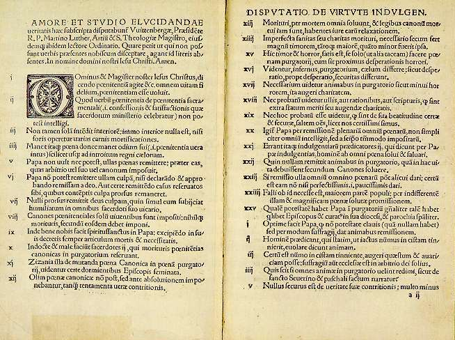 Disputatio pro declaratione virtutis indulgentiarum, 95 theses